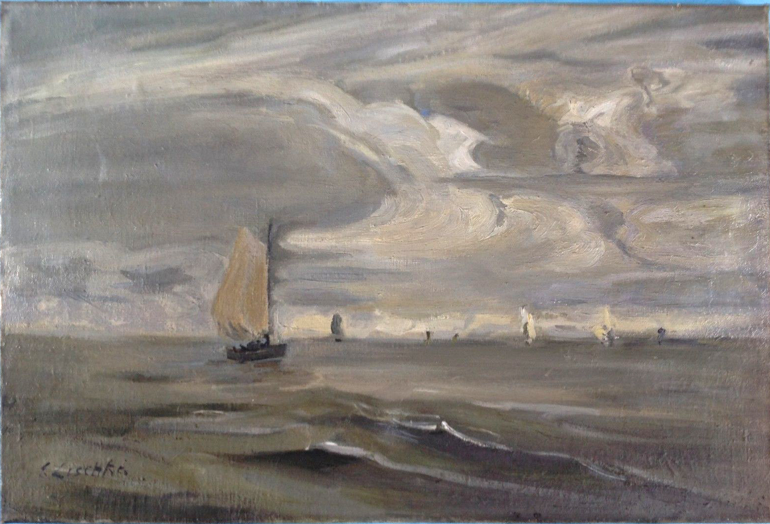 Segelschiff Meer Impression